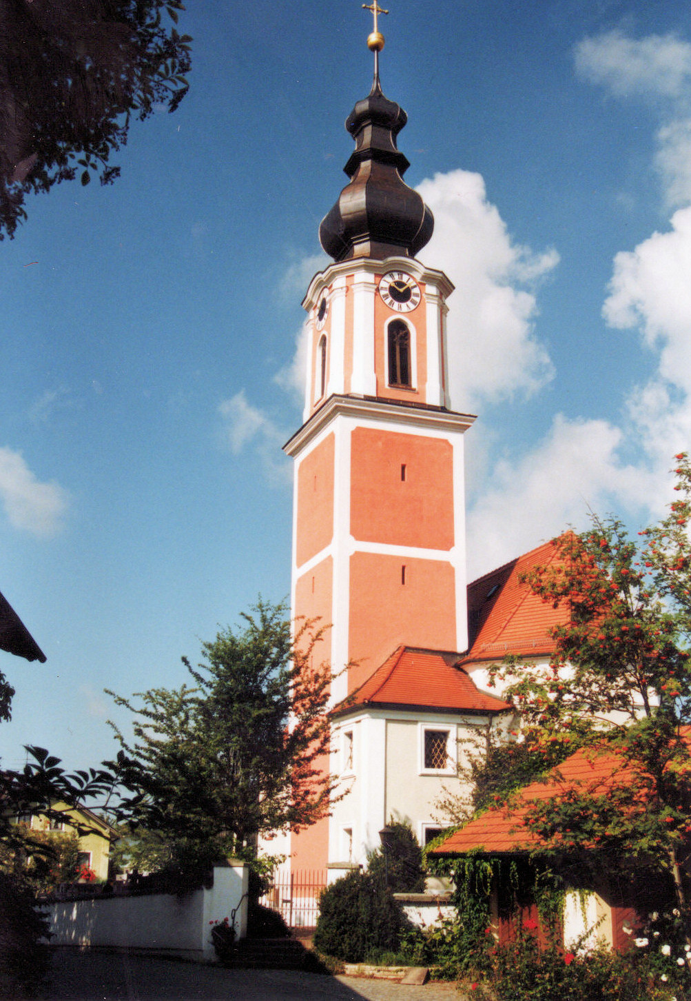 Haunzenbergersöll 1986 Kirche außen Kirchturm Barock Rokoko 1791 Zwiebelturm Chor Friedhof Ostansicht Pfarrkirche St. Johannes der Täufer